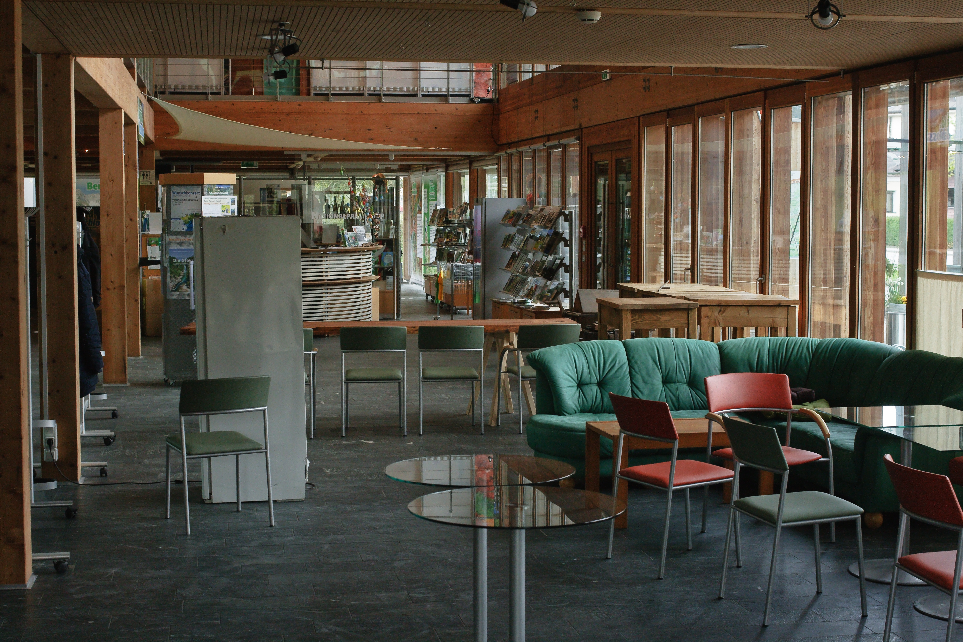 Nationalpark-Zentrum Molln: Erdgeschoss